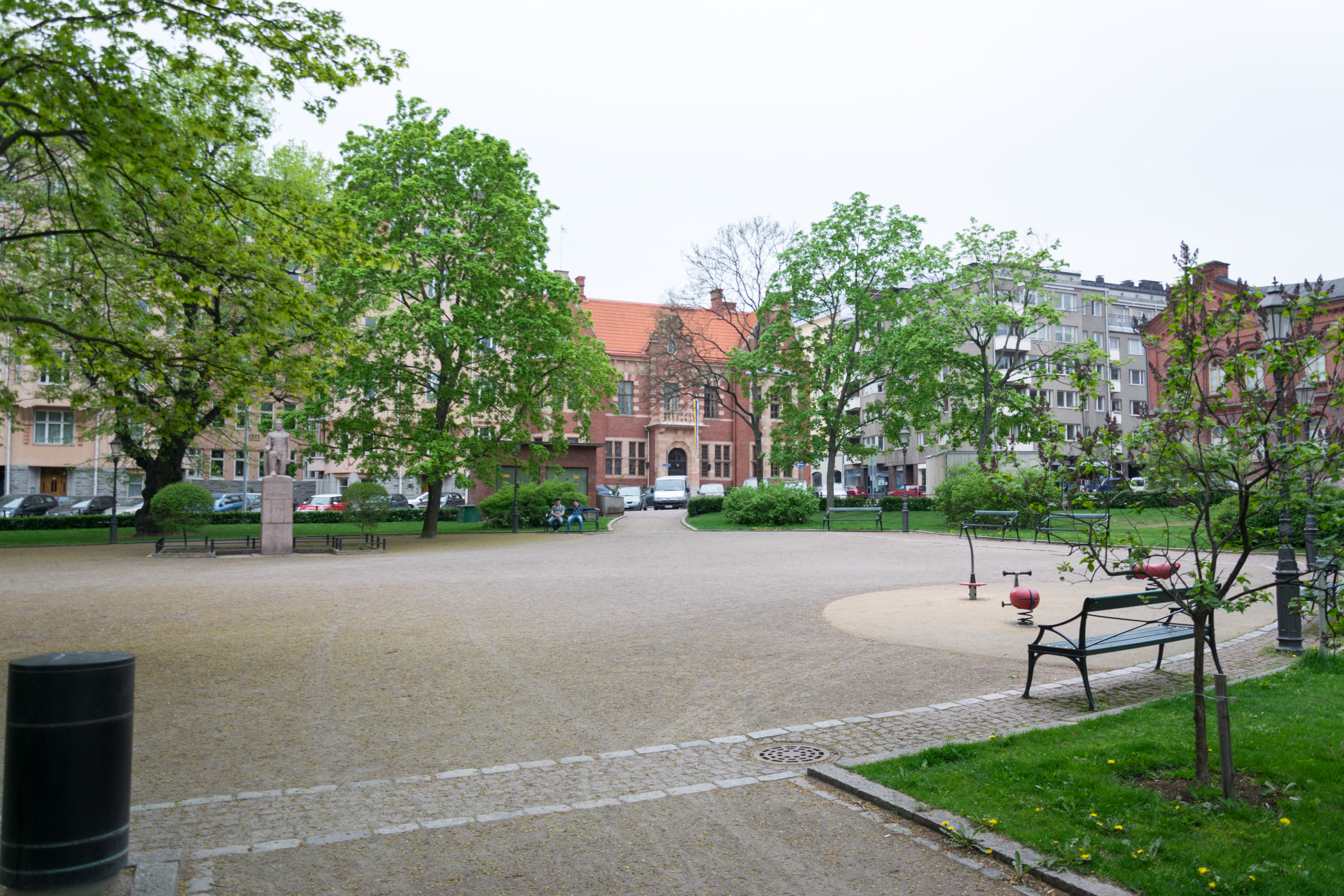 Liisanpuisto Helsingissä